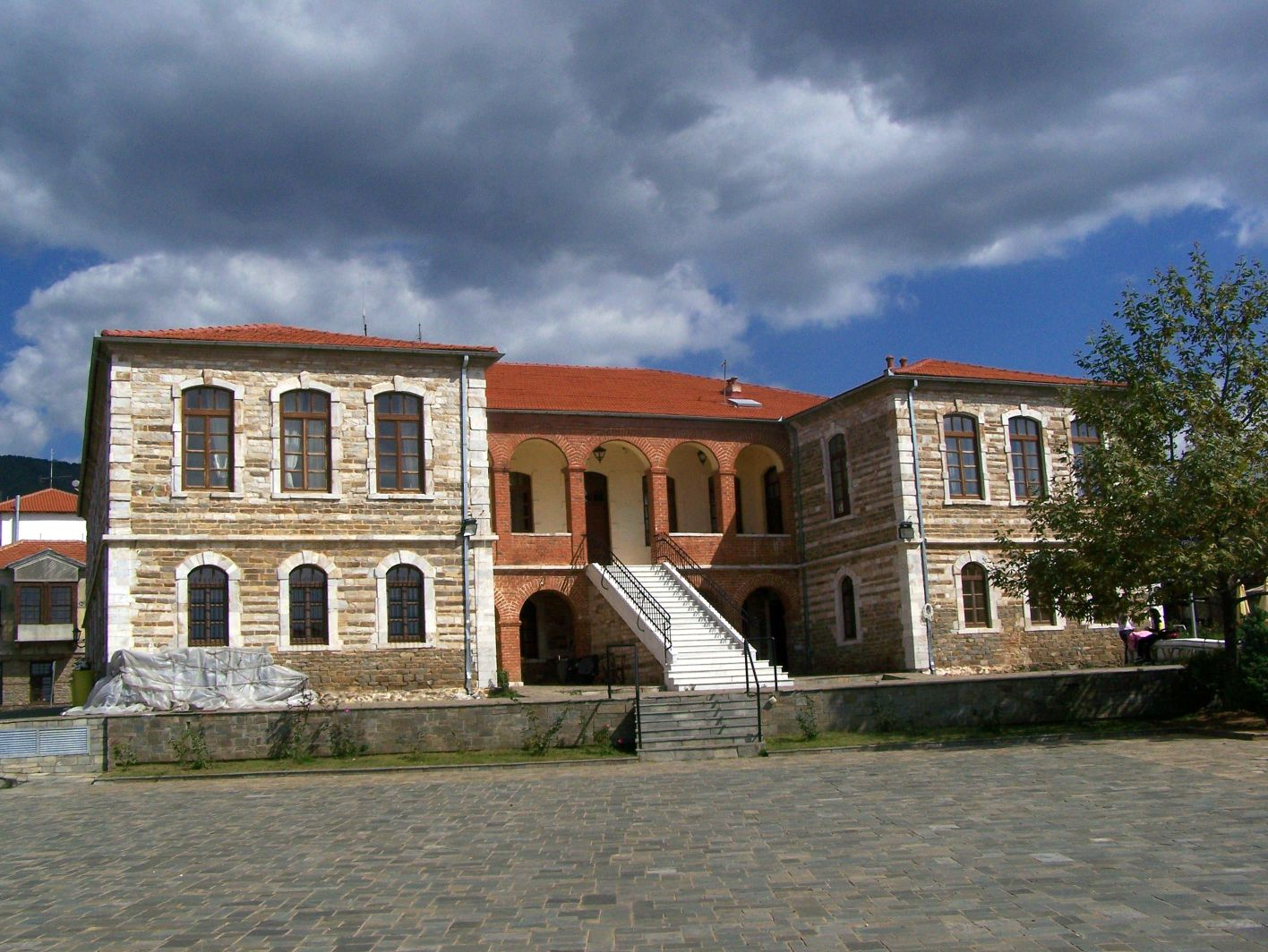 Das alte Rathaus in Polygyros